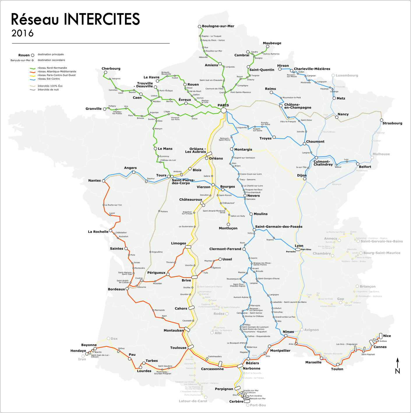 Le réseau Intercités en service début 2016.